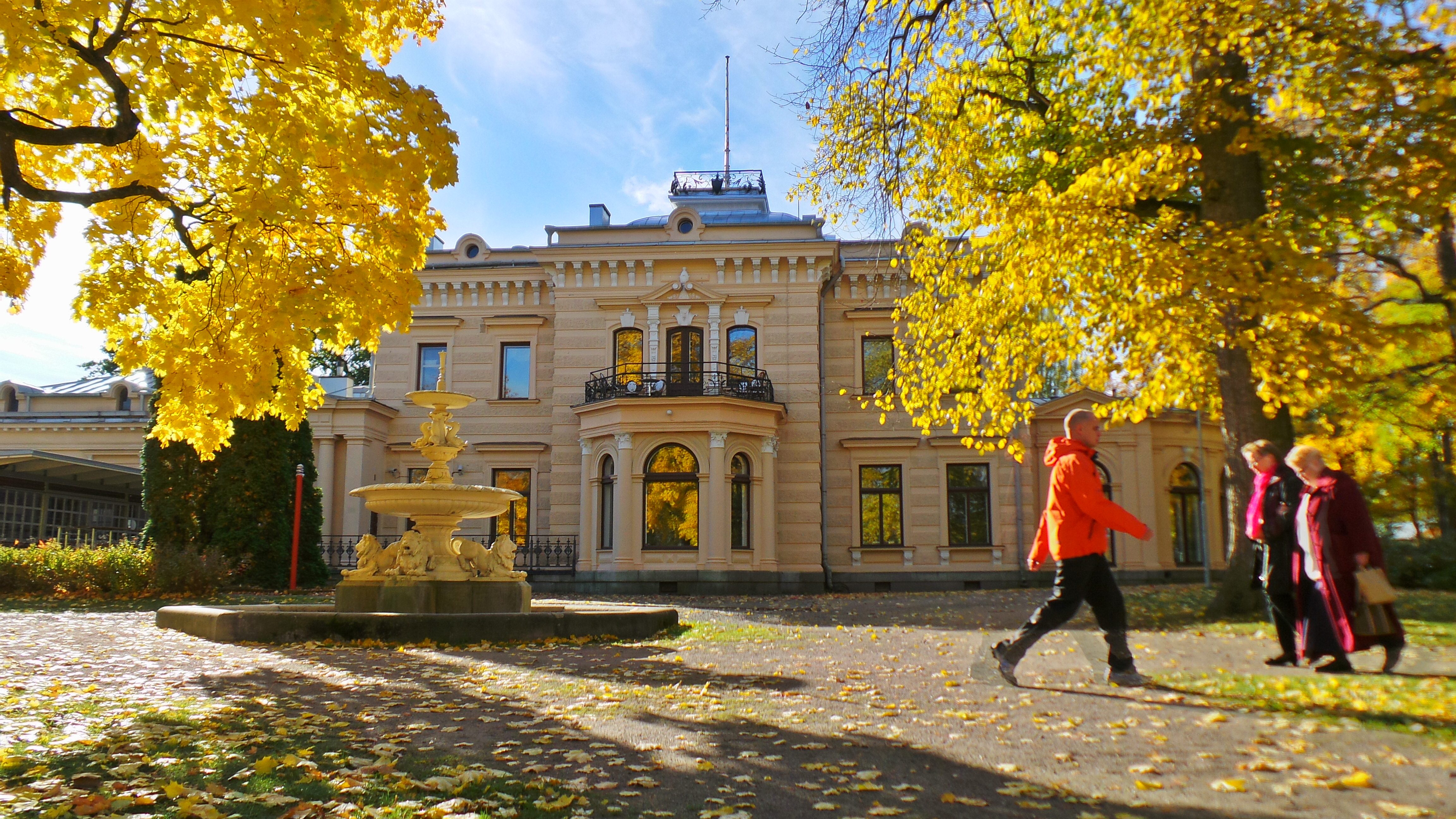 Palatsi in Wihelm von Nottbeckin puisto